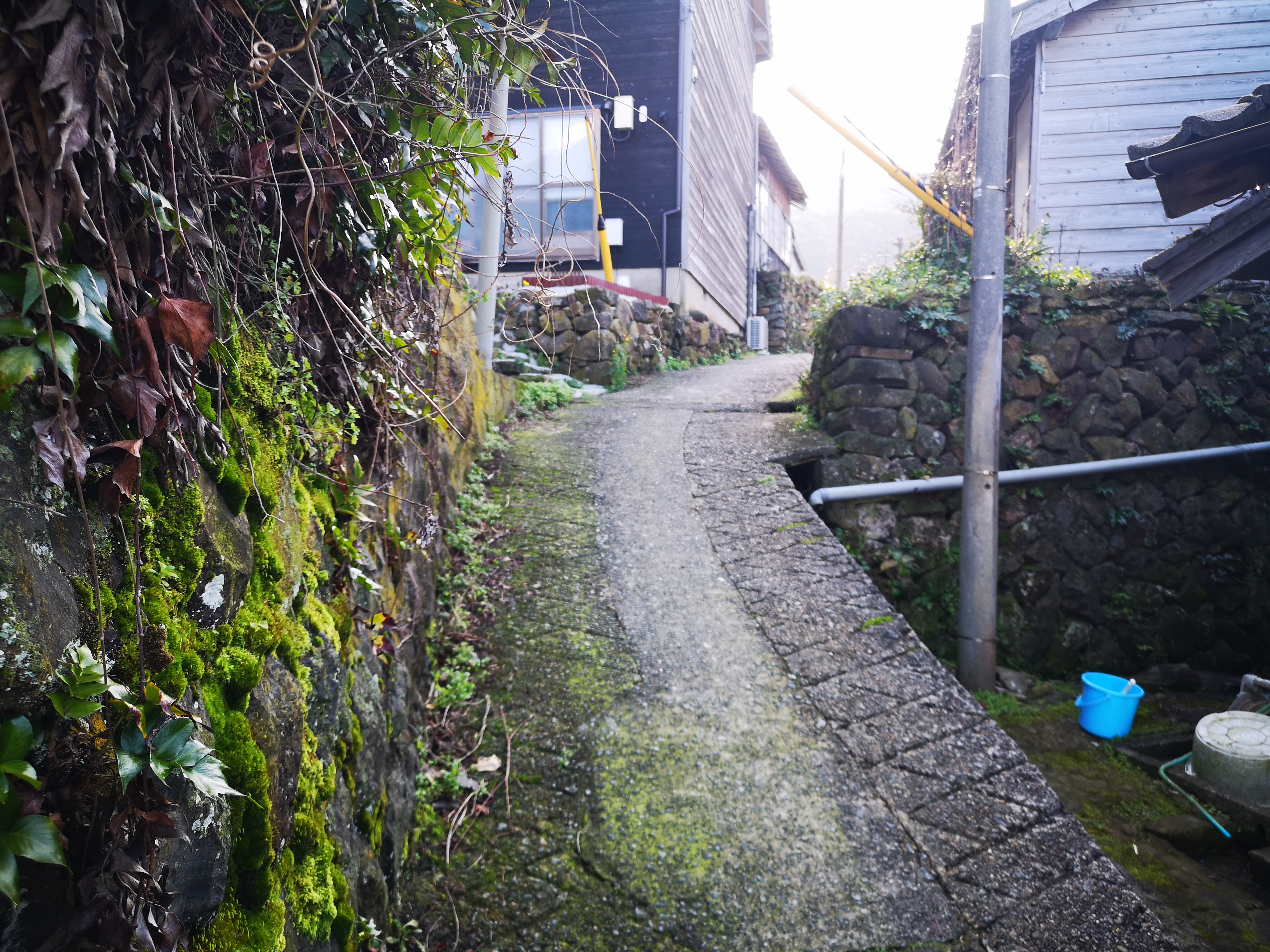 京丹後市網野町磯区内